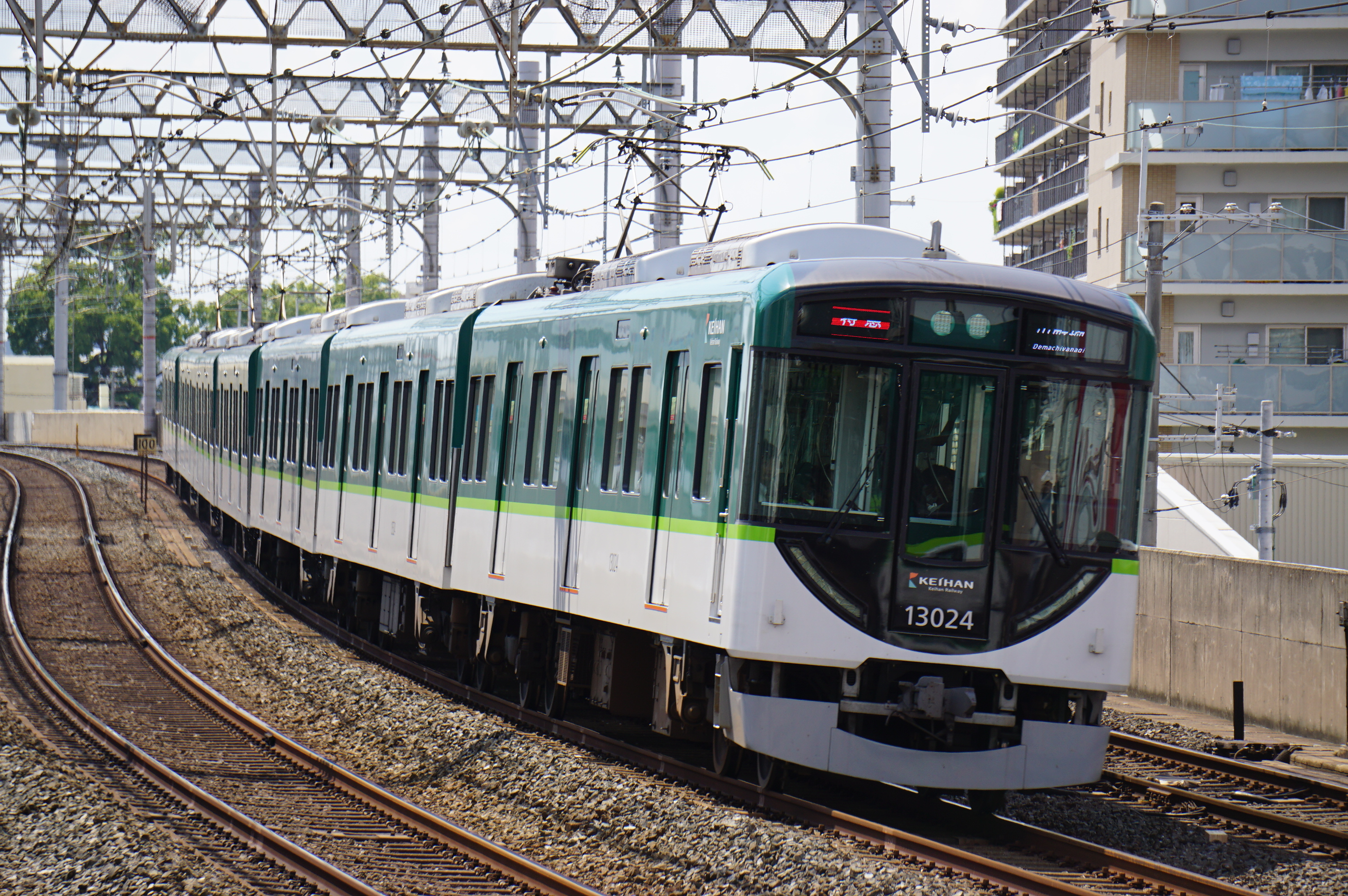 特急運用に入った13024F